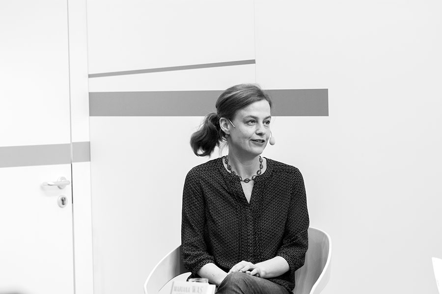 Mariana Leky auf der Frankfurter Buchmesse 2017. „Was man von hier aus sehen kann“